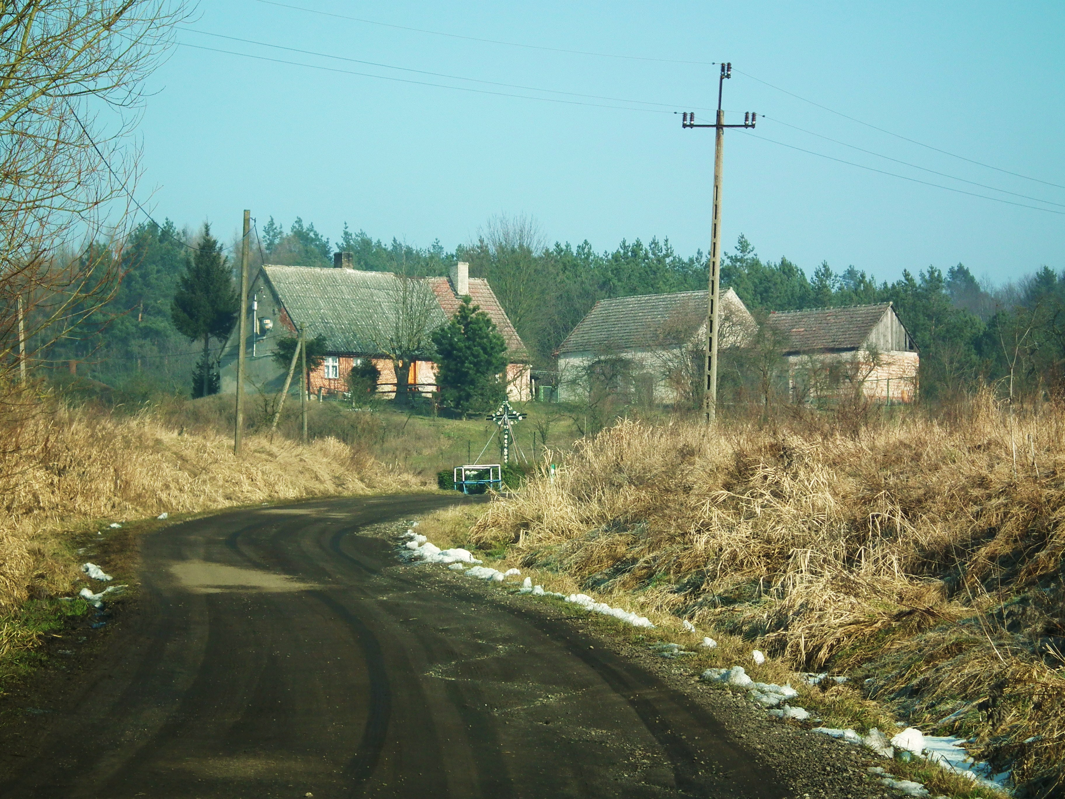 Wieś Górzyska na skraju dol. Noteci.